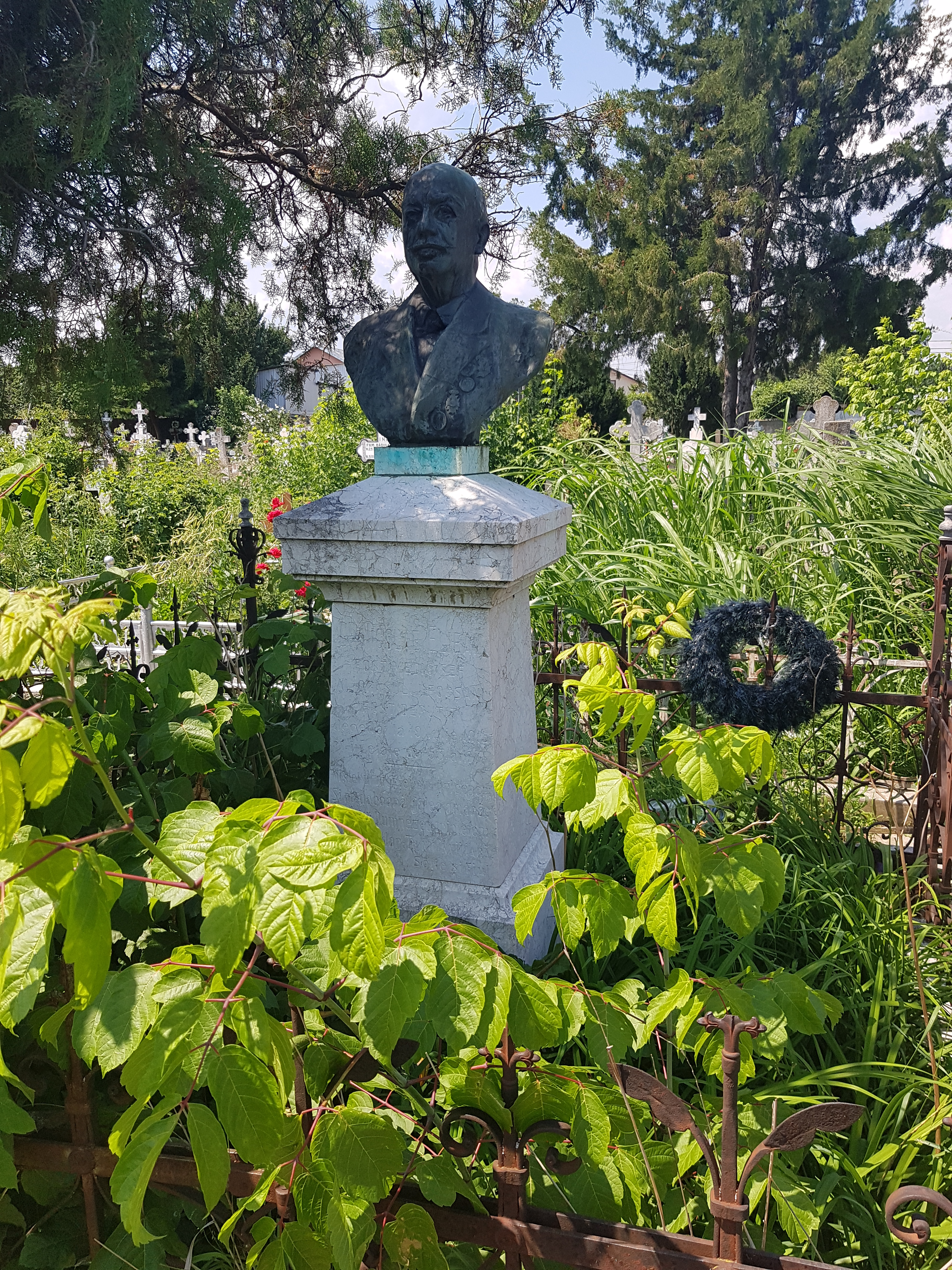 Bustul dr. N. Eliean